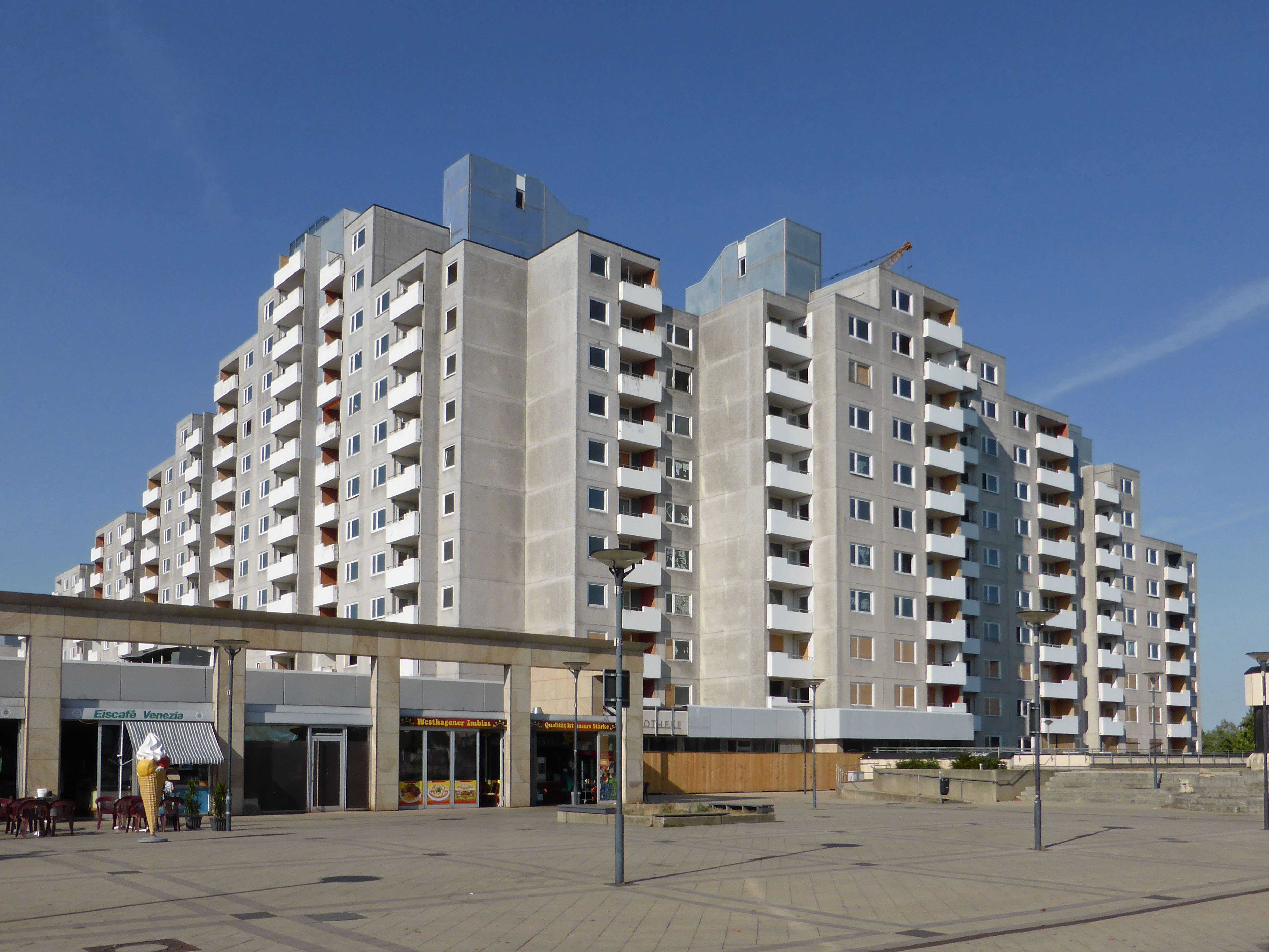 Wohnblock an der Dessauer Straße in Westhagen in Wolfsburg aus den 1970er Jahren, von 2018 bis 2020 abgerissen. Links im Vordergrund ein Teil des Einkaufszentrums.